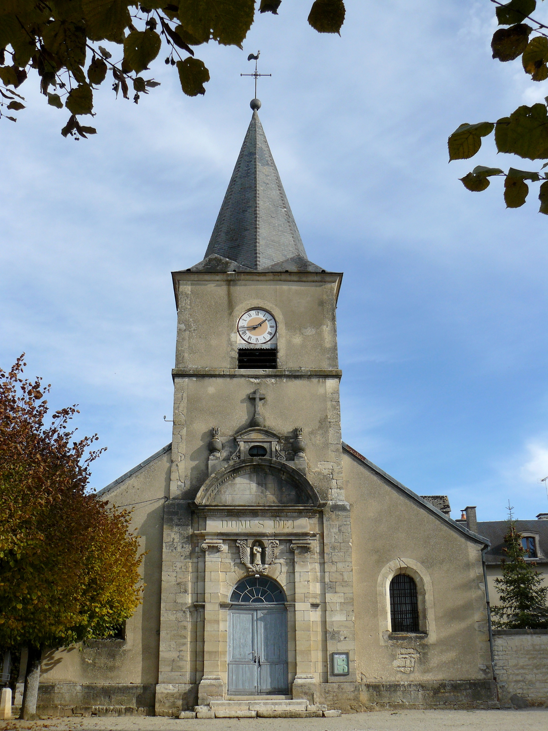 Autricourt, (Côte d'Or - France) - L'église